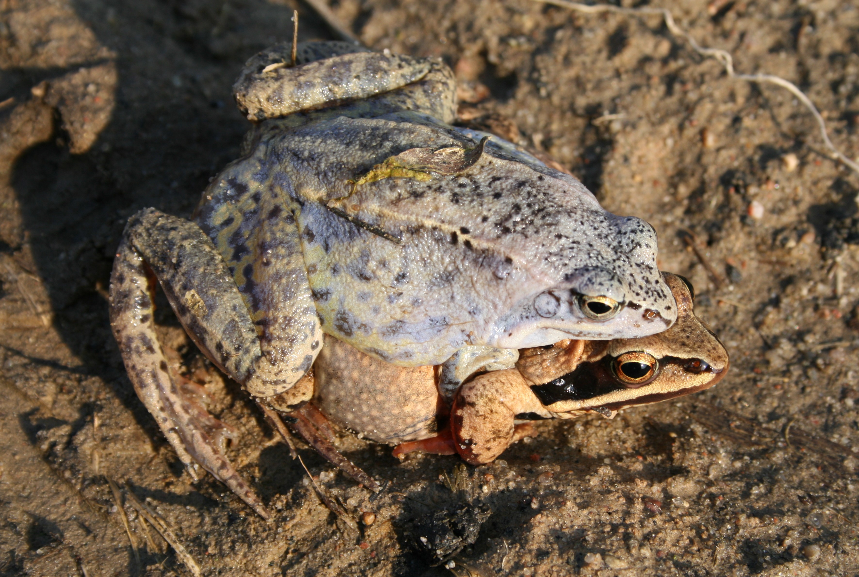 Rana arvalis pl: Ampleksus żaby moczarowej, samiec w szacie godowej en: Moor Frog, amplexus de: Moorfrosch, amplexus